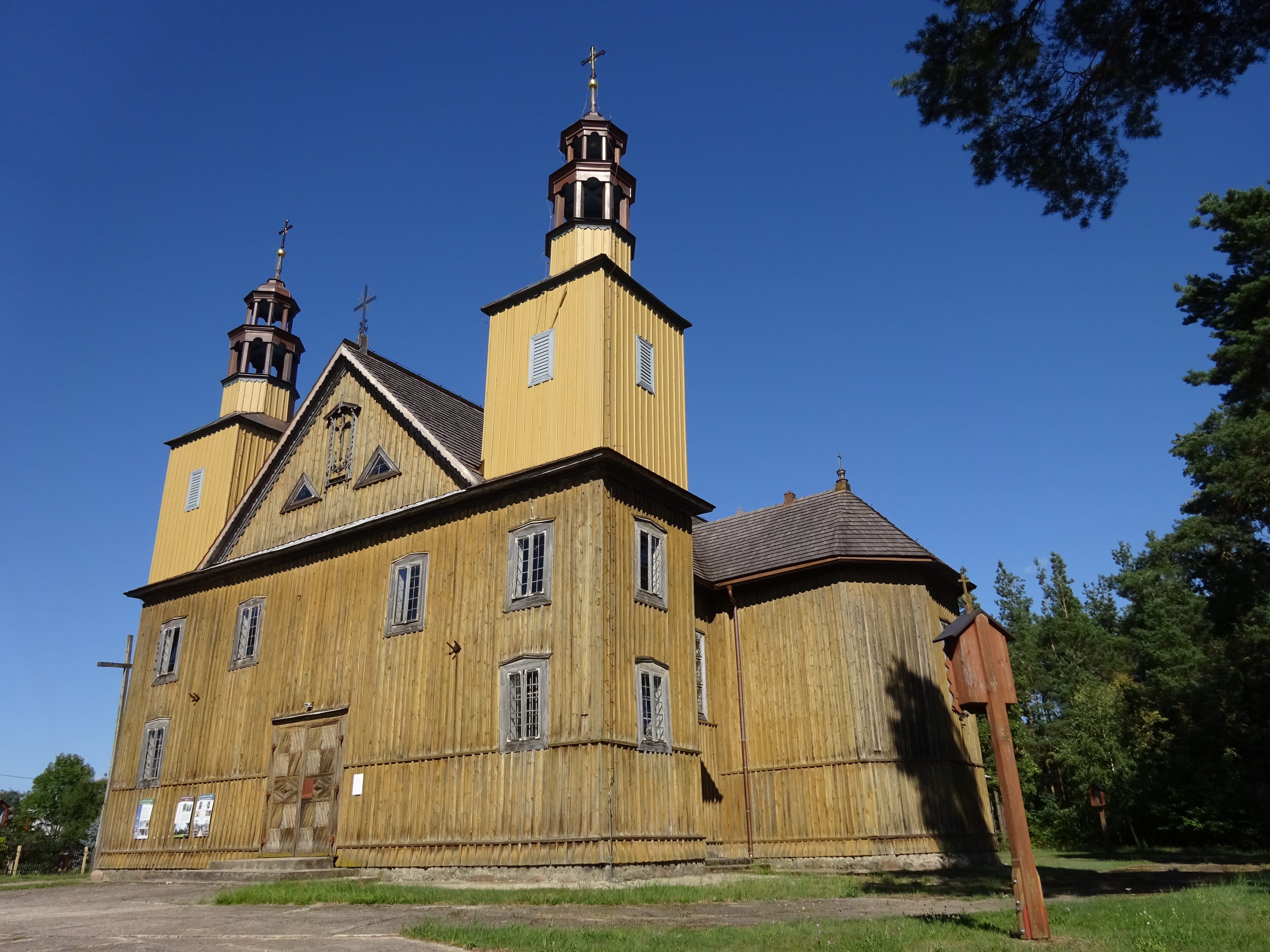 Kościół pw. św. Anny w Łysych